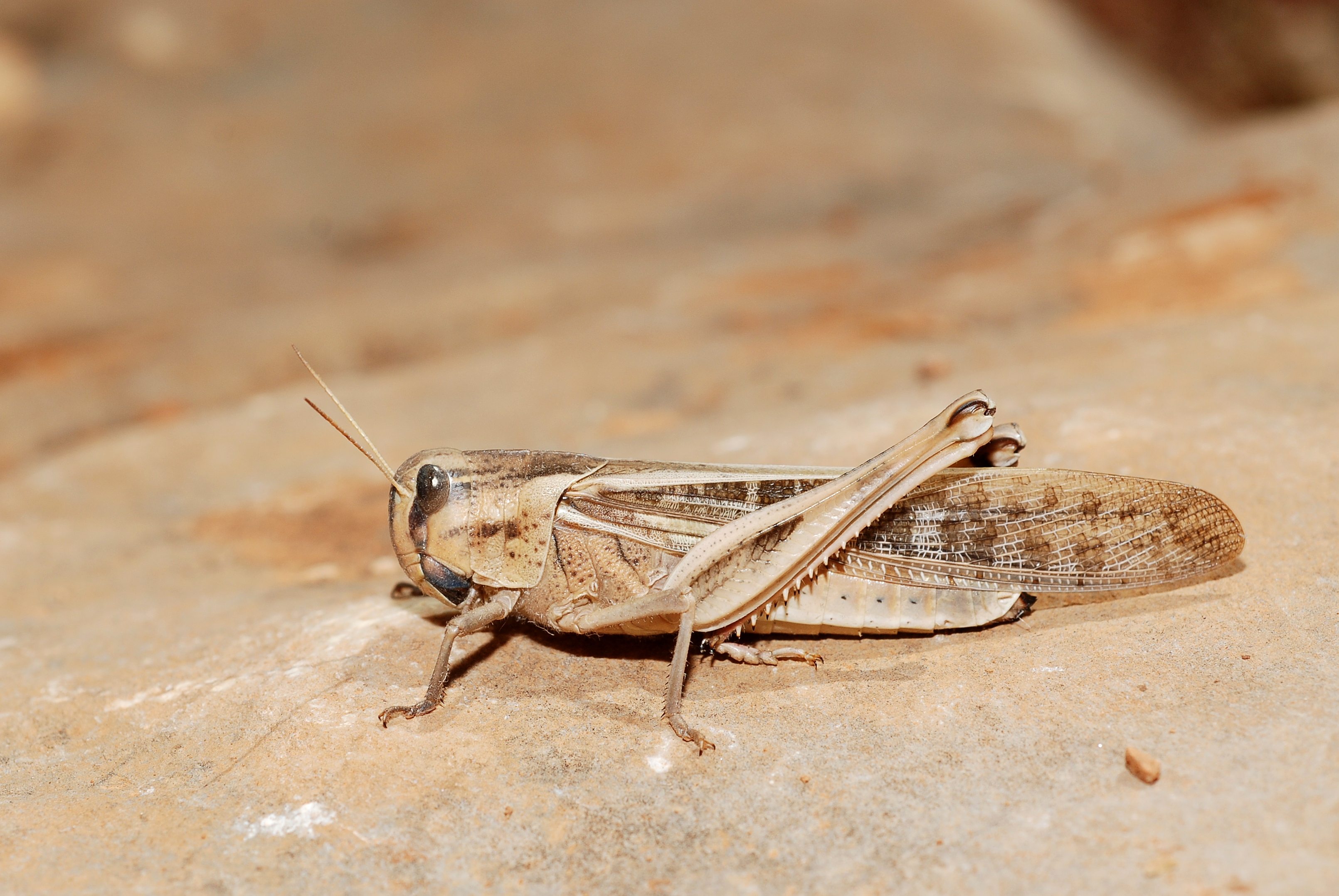 Locusta migratoria (gregarious phase)